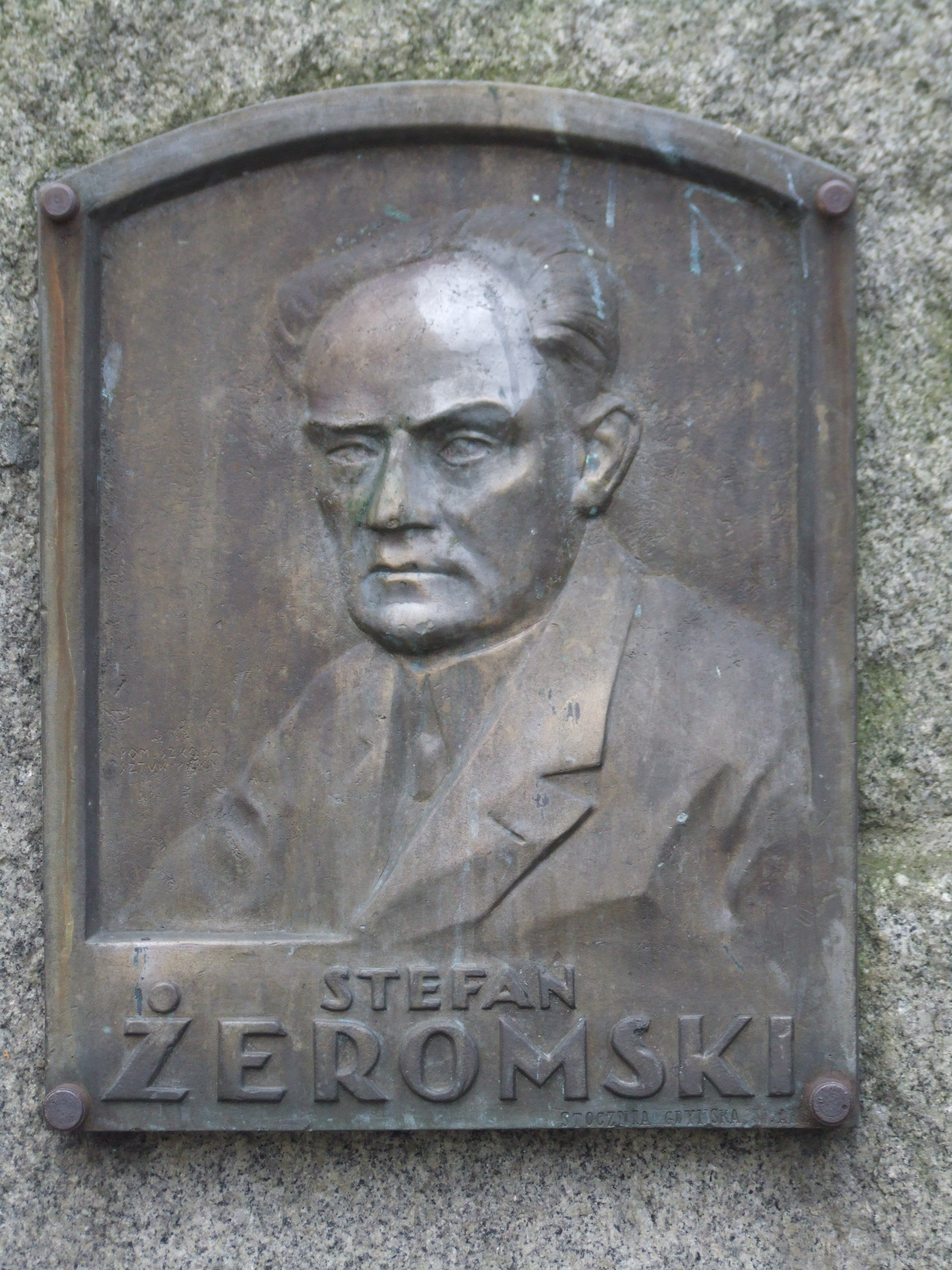 Pomnik Stefana Żeromskiego, Gdynia-Śródmieście